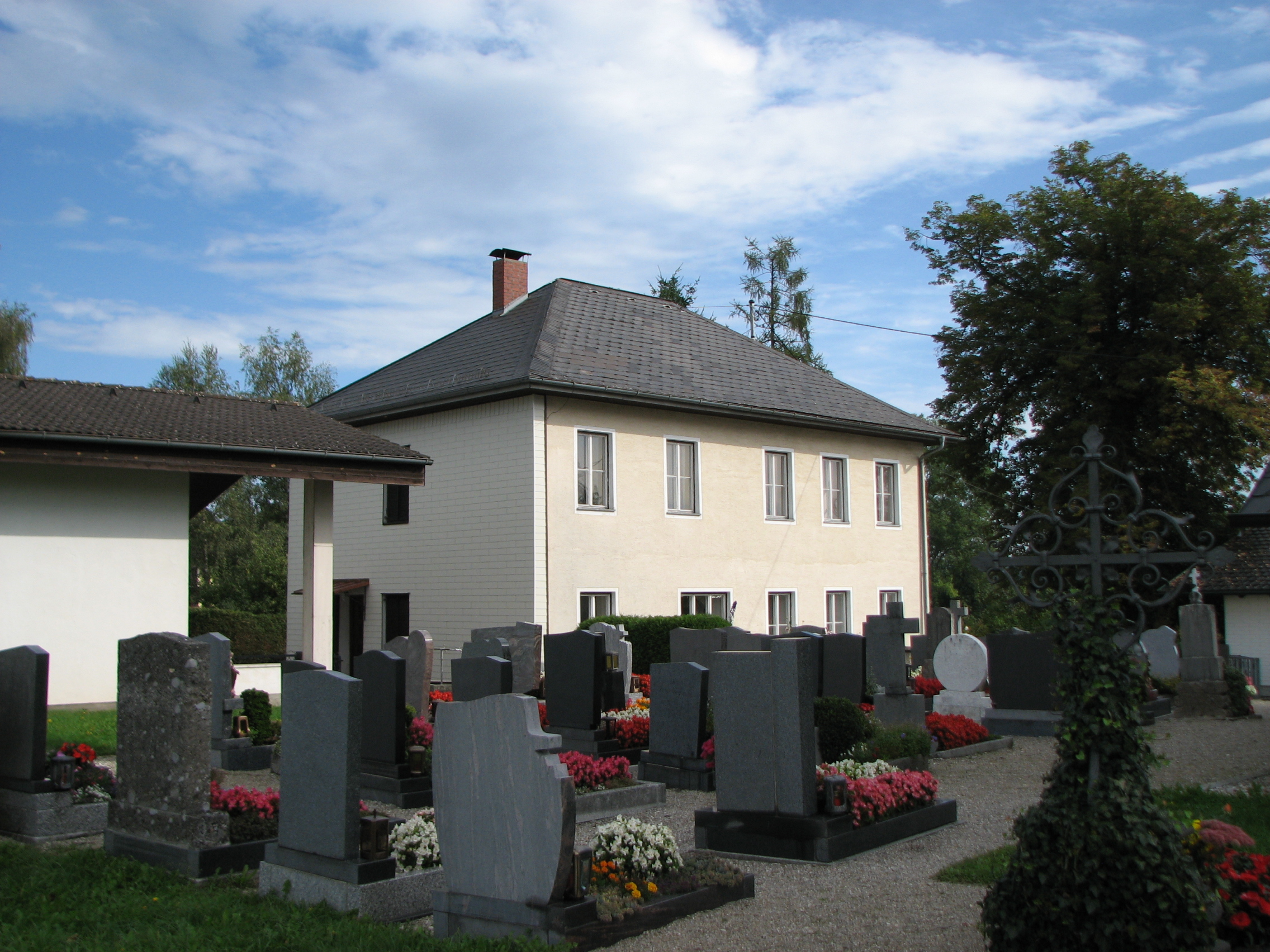 Pfarrhof